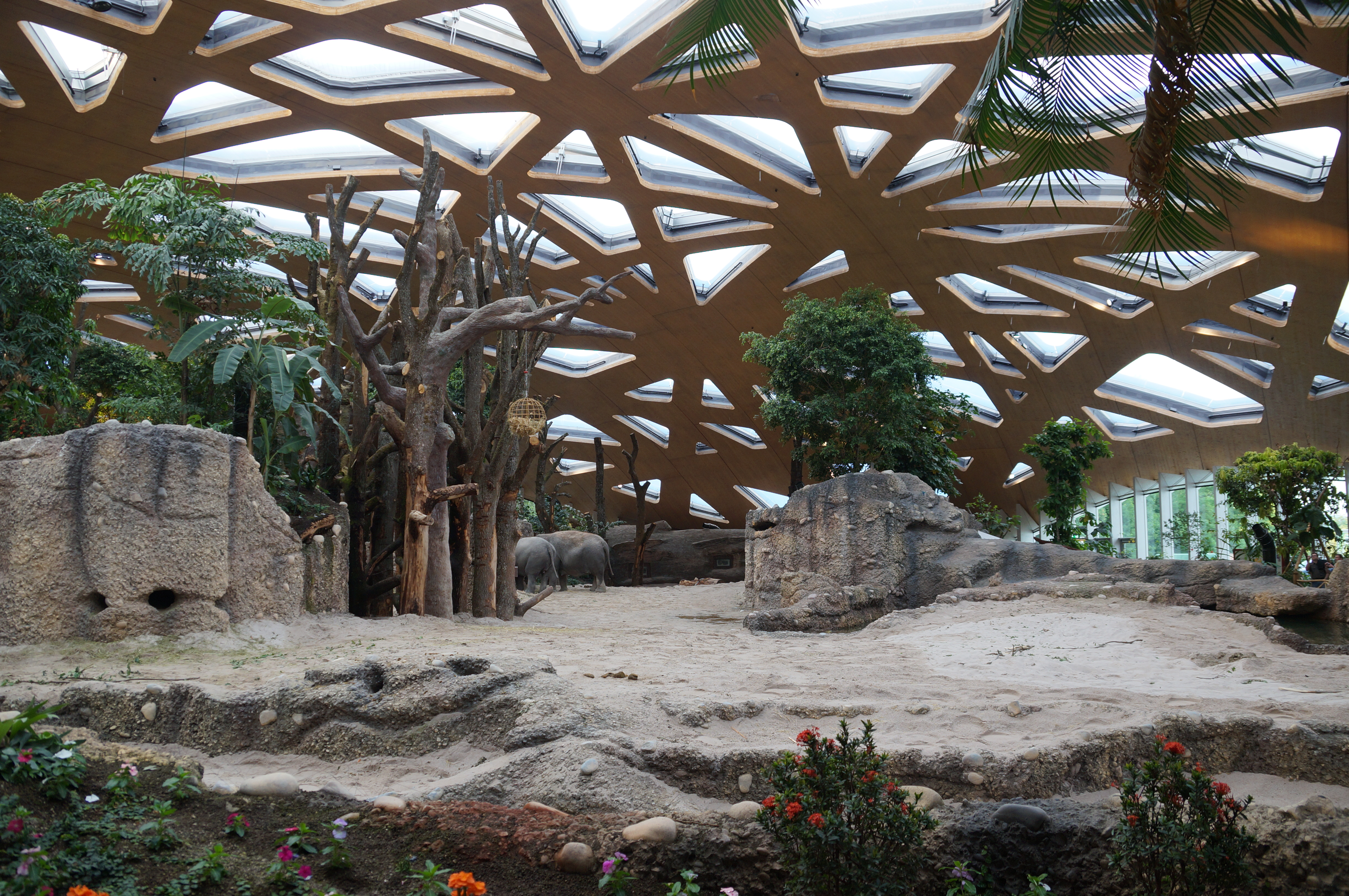 Zoo Zürich: Kaeng Krachan Elefantenpark: Innenanlage